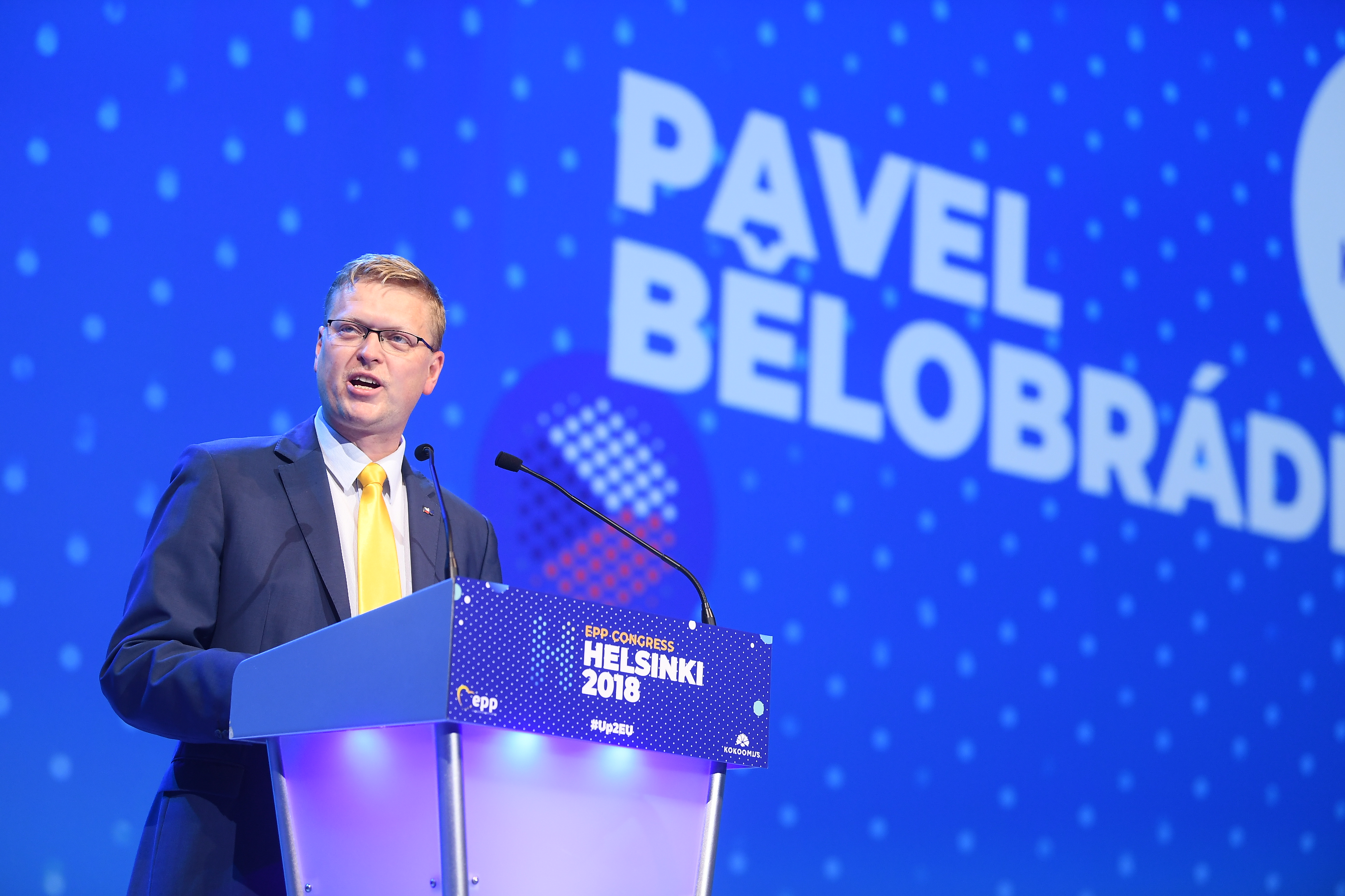 7 November 2018